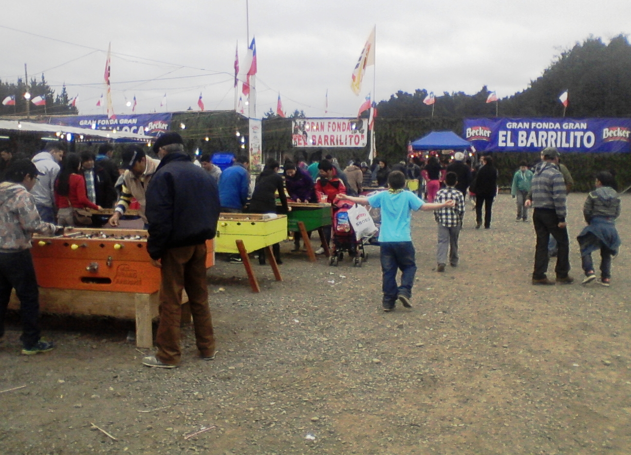 Isla Cautín, en Temuco, Chile, durante la celebracón de Fiesta Patrias en 2014.